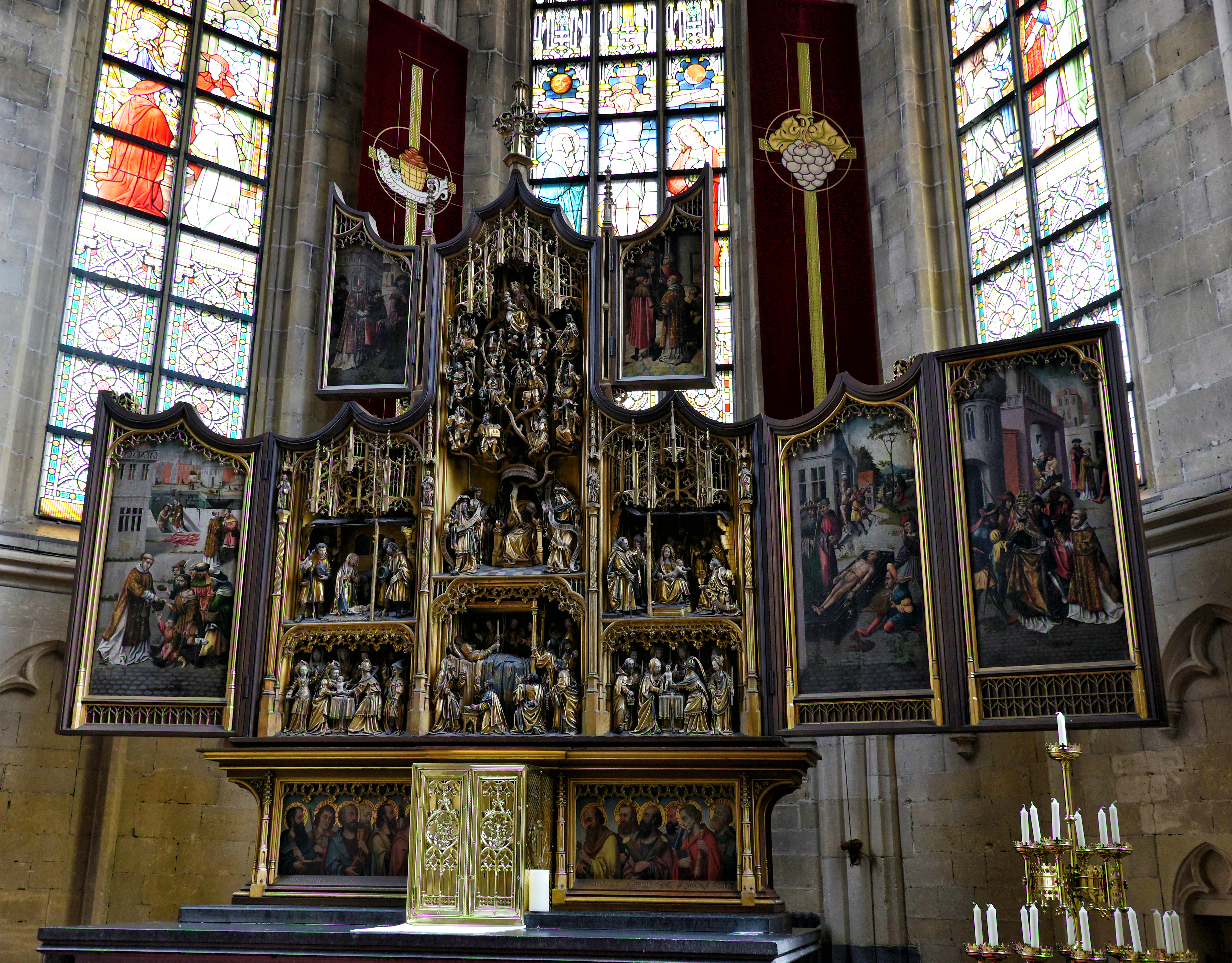 Antwerps Mariaretabel (ca. 1525) Sint-Laurentiuskerk (Bocholt) 8-09-2019 This photo of movable heritage has been taken in the Flemish Region